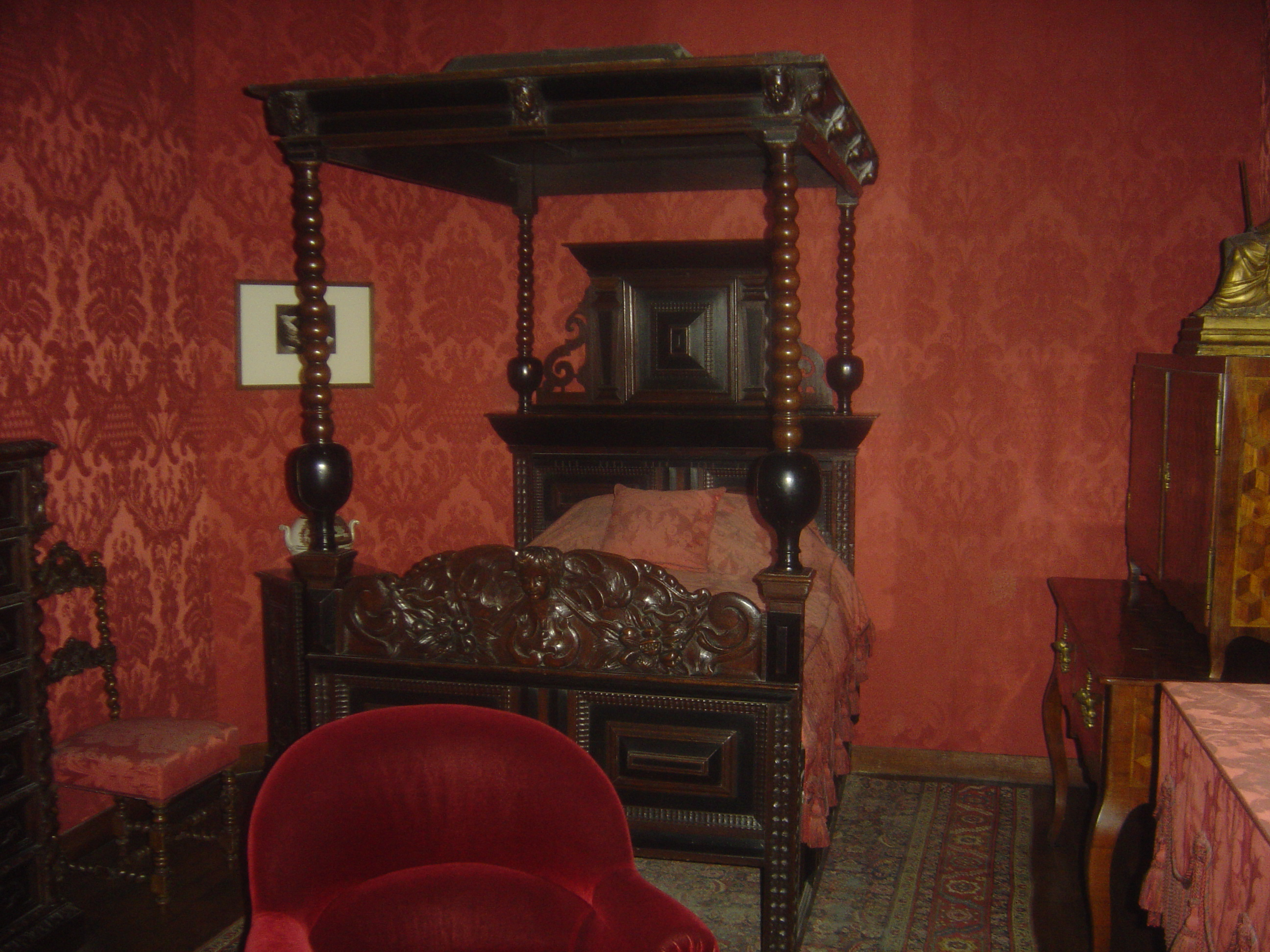 Μουσείο Βικτόρ Ουγκώ, Παρίσι - Το υπνοδωμάτιο του συγγραφέα με το περίτεχνο κρεβάτι του.